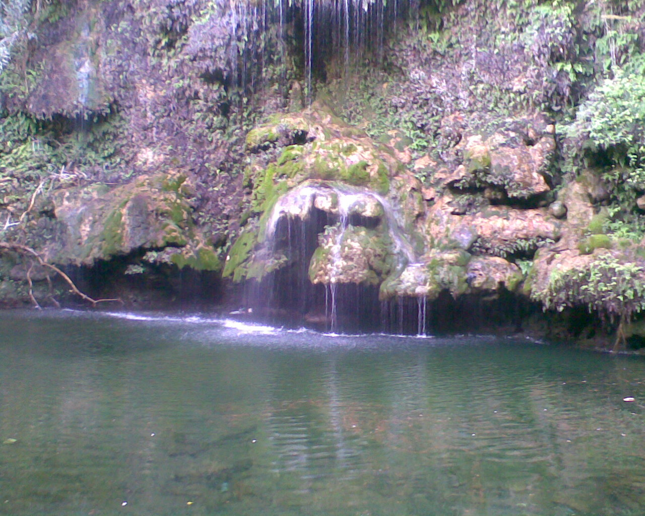 شلال رأس الهلال في الجبل الأخضر - ليبيا. Ras al Helal waterfalls, Jebel Akhdar, Libya.